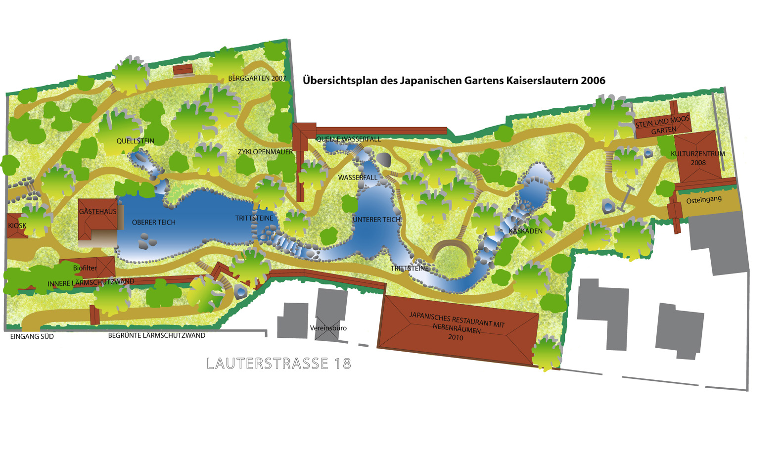 Übersichtsplan des japanischen Gartens Kaiserslautern / Overview of the Japanese Garden Kaiserslautern, Germany